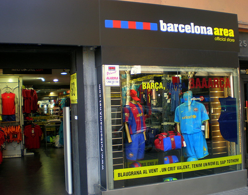 Botiga a la Ronda Sant Pau.